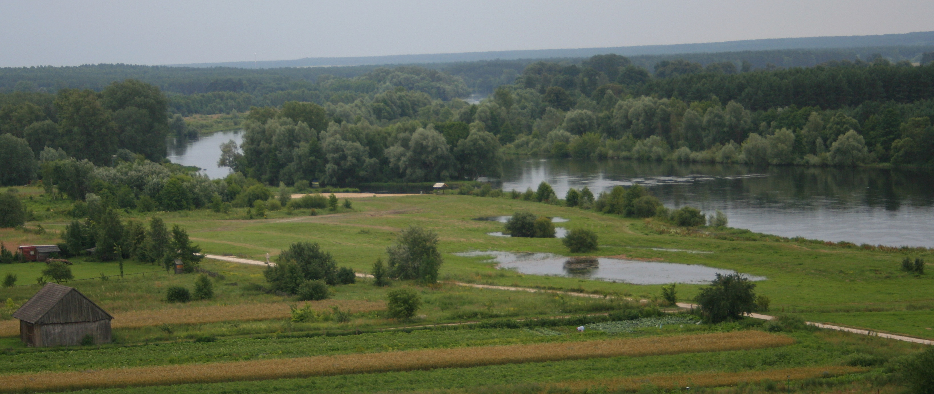 Mielnik, woj. podlaskie - widok na Bug z Góry Zamkowej